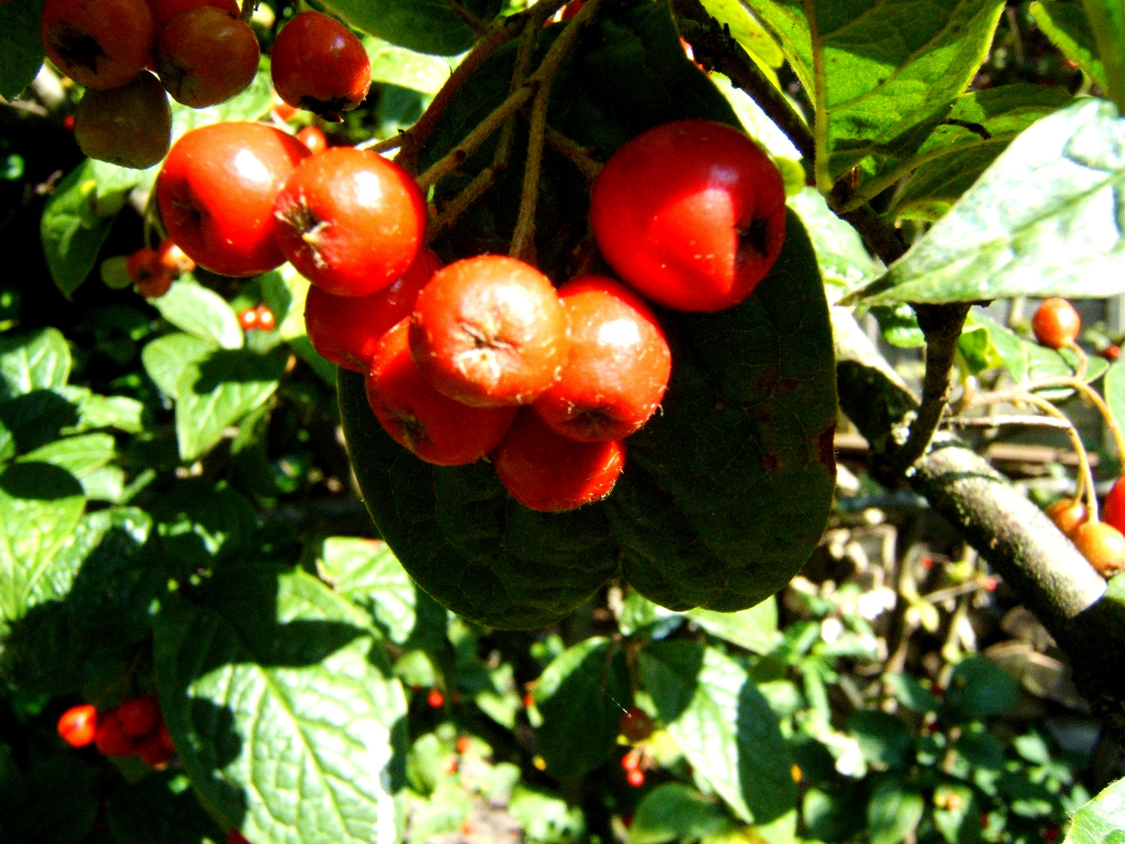 Deze appeltjes hebben de grootte van flinke kersen.